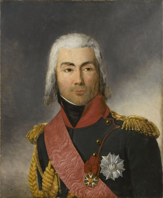 Jean-Baptiste Bessières (1768-1813), maréchal d'Empire et duc d'Istrie, colonel-général de la cavalerie de la Garde impériale.